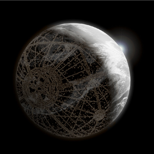 Représentation de Trantor, la planète-cité imaginée par Isaac Asimov. Peut aussi servir à illustrer Coruscant (Star Wars).